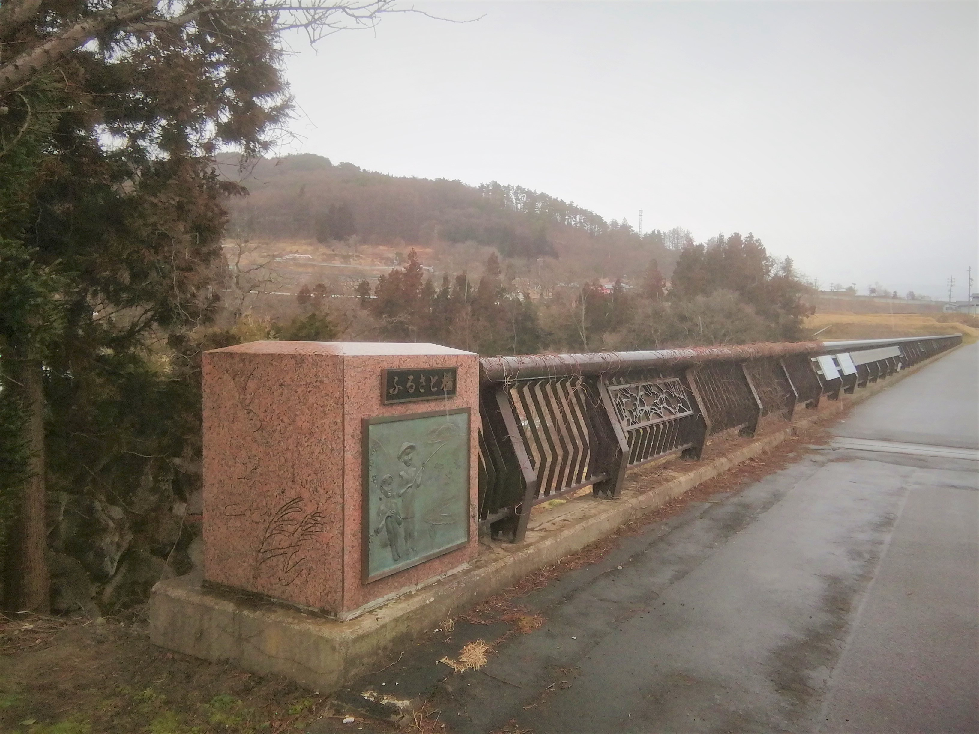 故郷橋（2020-2-22）